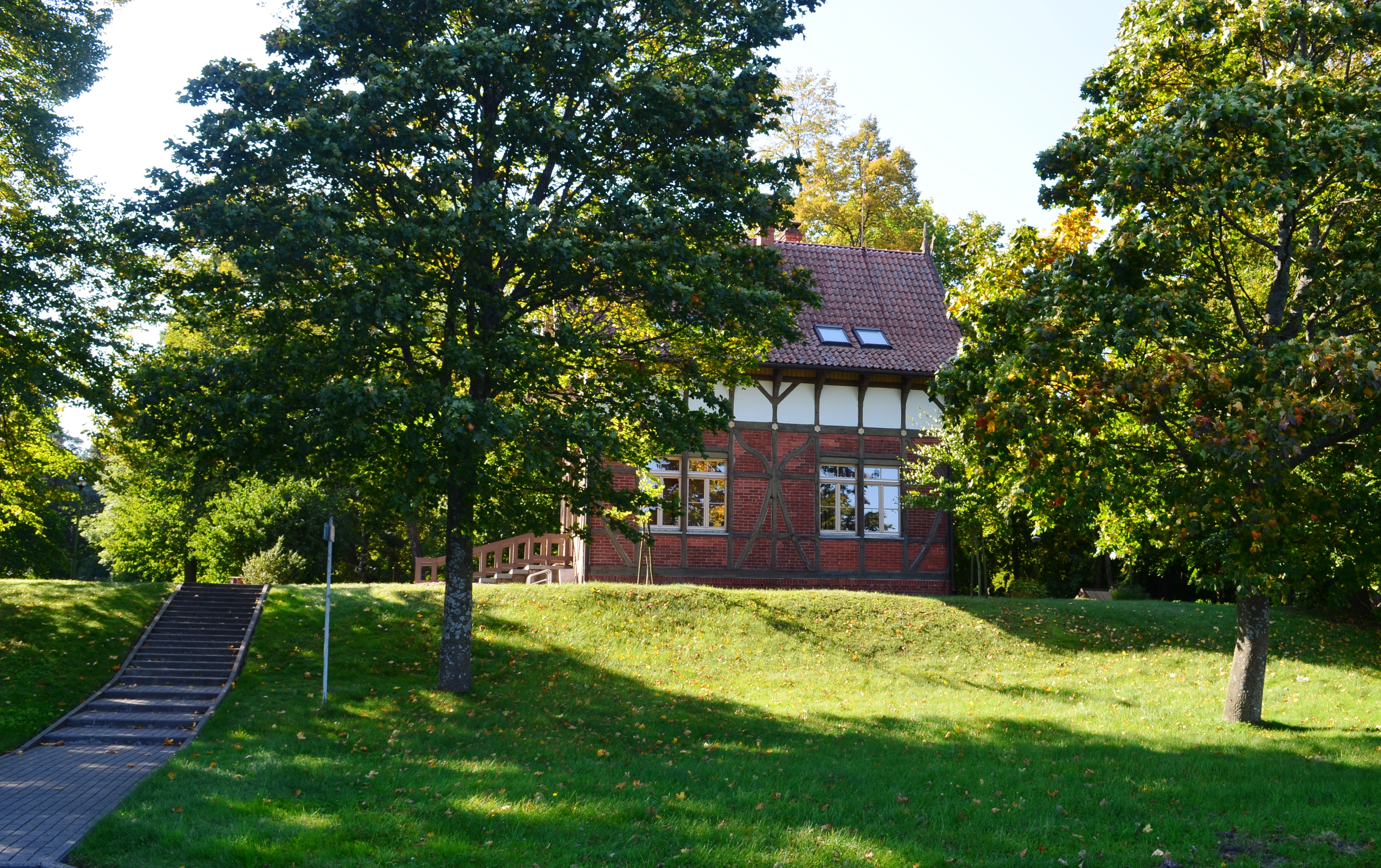 Vila Smiltynėje, Klaipėda